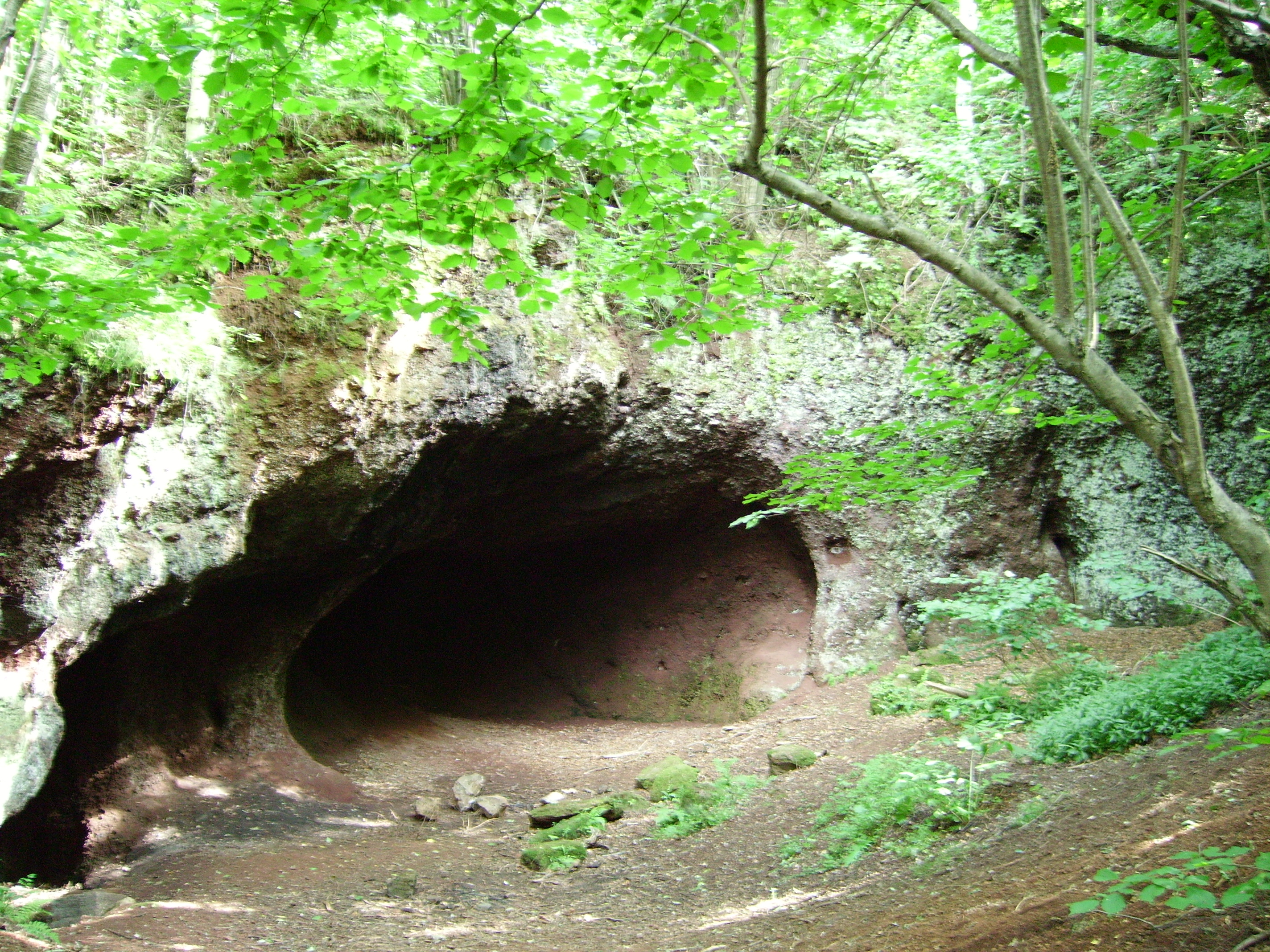 Venušina sopka u Meziny